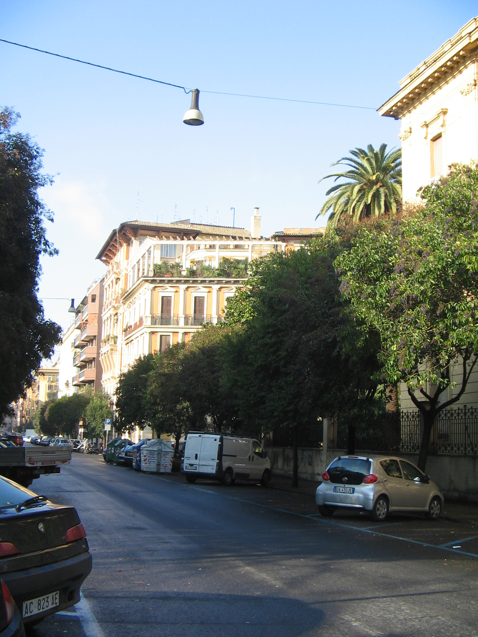 Un villino primo novecento a Roma, nel quartiere Della Vittoria via Ciro Menotti - Via Giovanni Nicotera